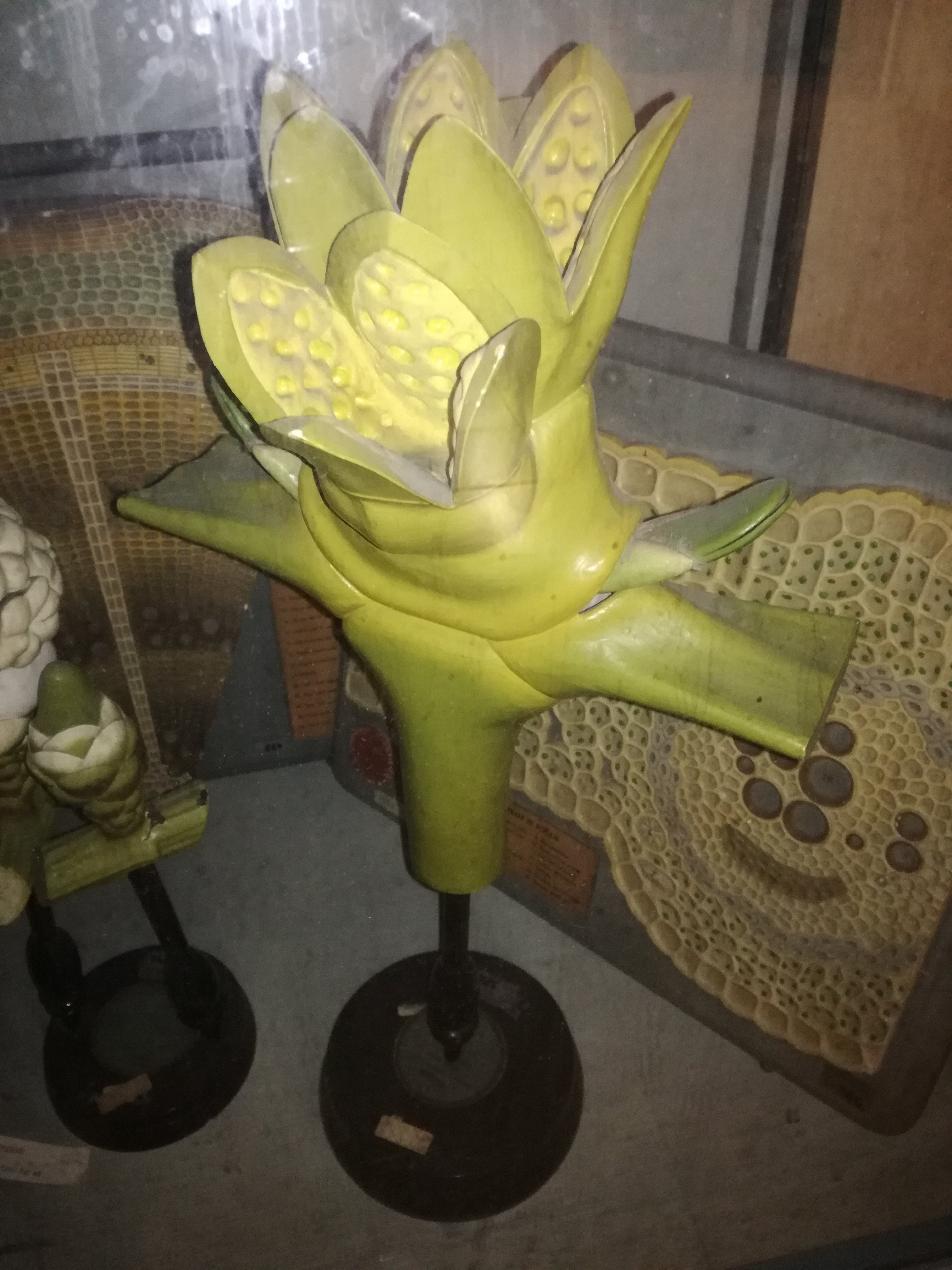 Modelli botanici della manifattura Brendel conservati al liceo ginnasio Dante di Firenze